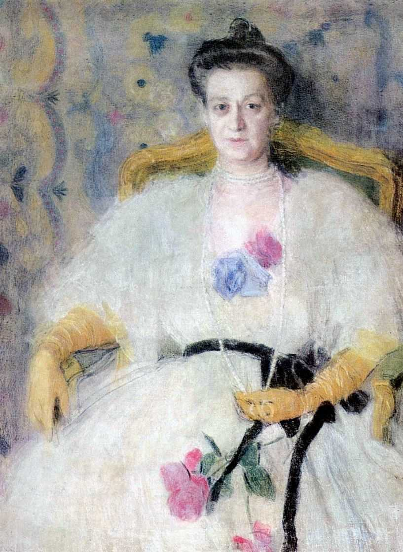 Головин Александр. Портрет М.В.Воейковой. 1905 Портрет Марии Владимировны Воейковой (1865—1933), жены адъютанта военного министра В. А. Сухомлинова